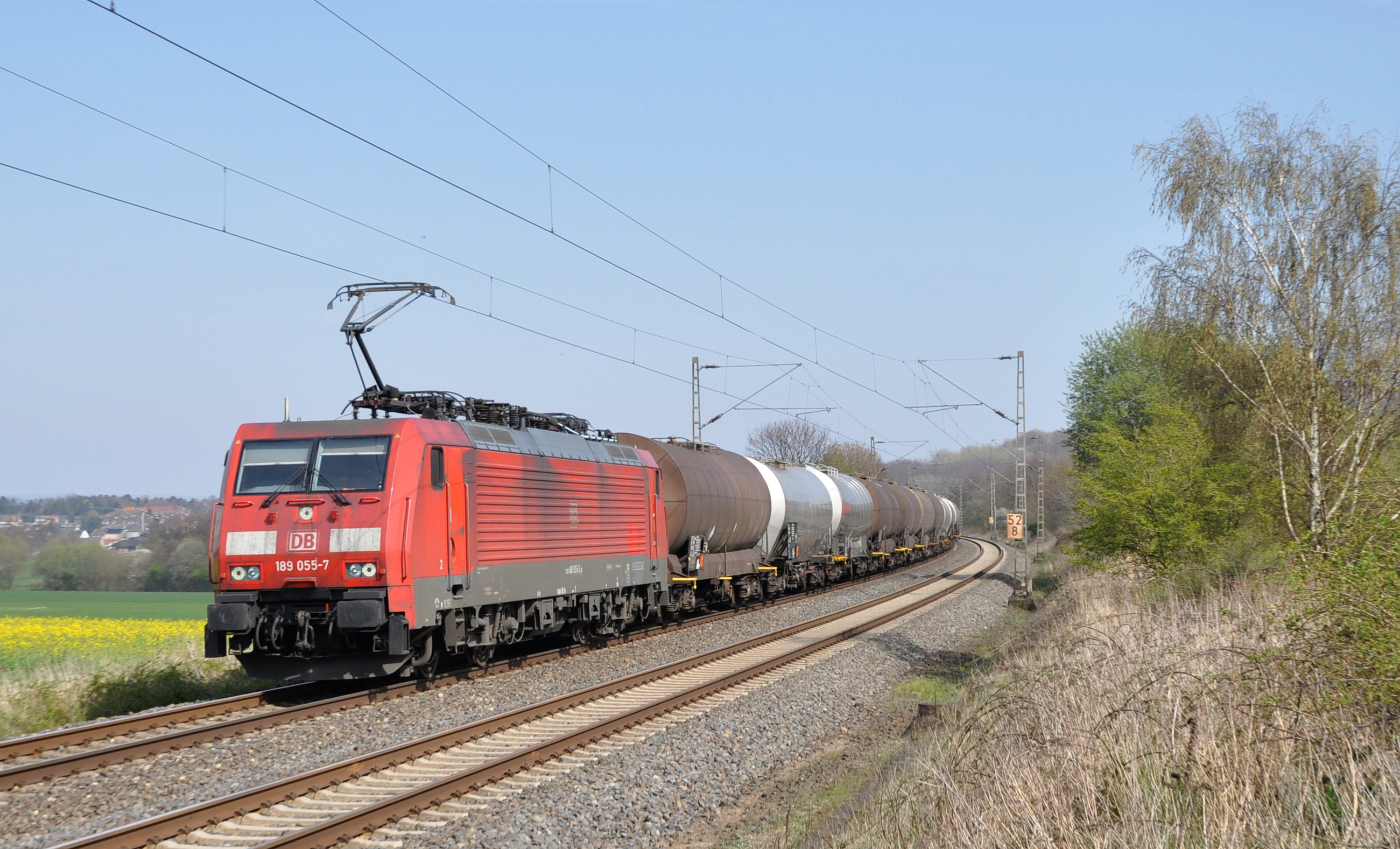 189 055 / DB Schenker // Eschweiler / 29. März 2014